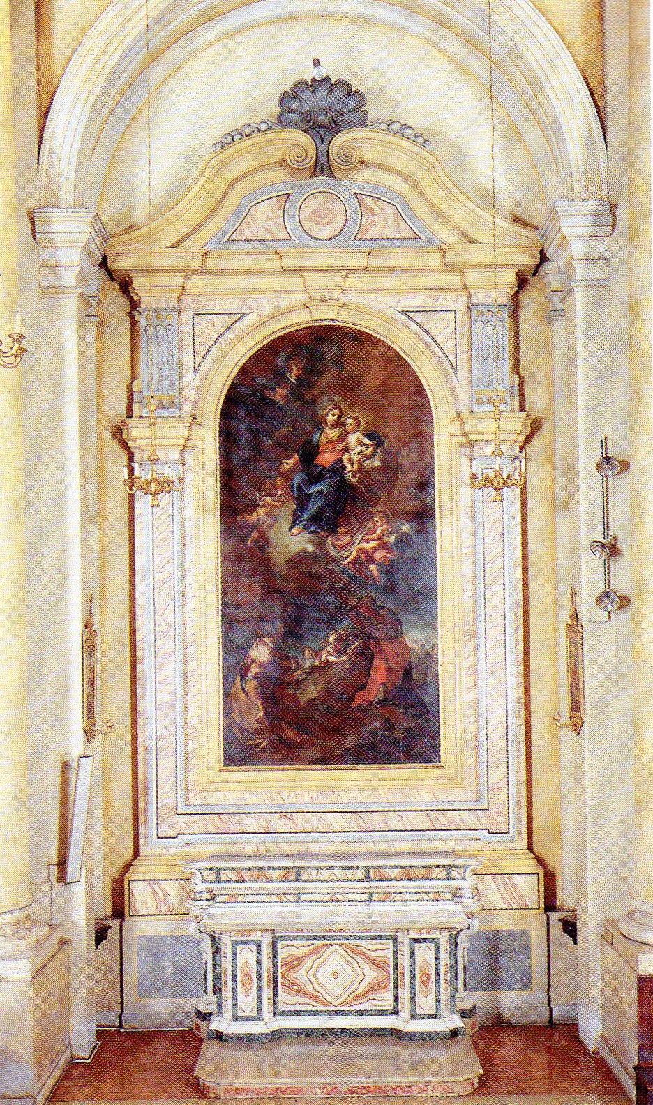 San_lorenzo_brescia_madonna_della_misericordia.jpg